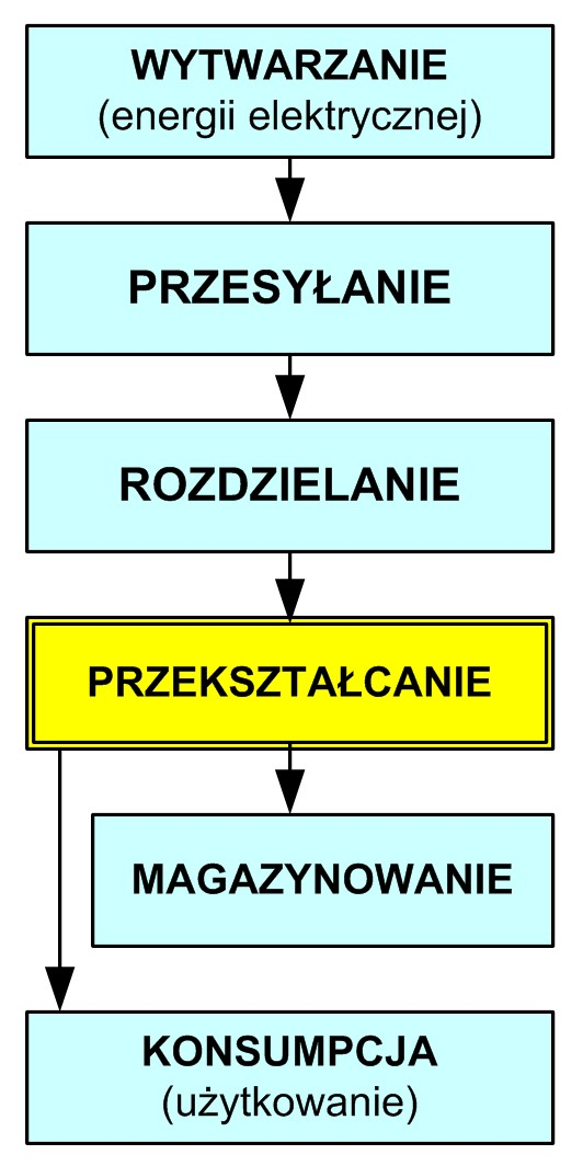 Schemat blokowy przedstawiający lokalizację energoelektroniki w procesie przetwarzania energii.